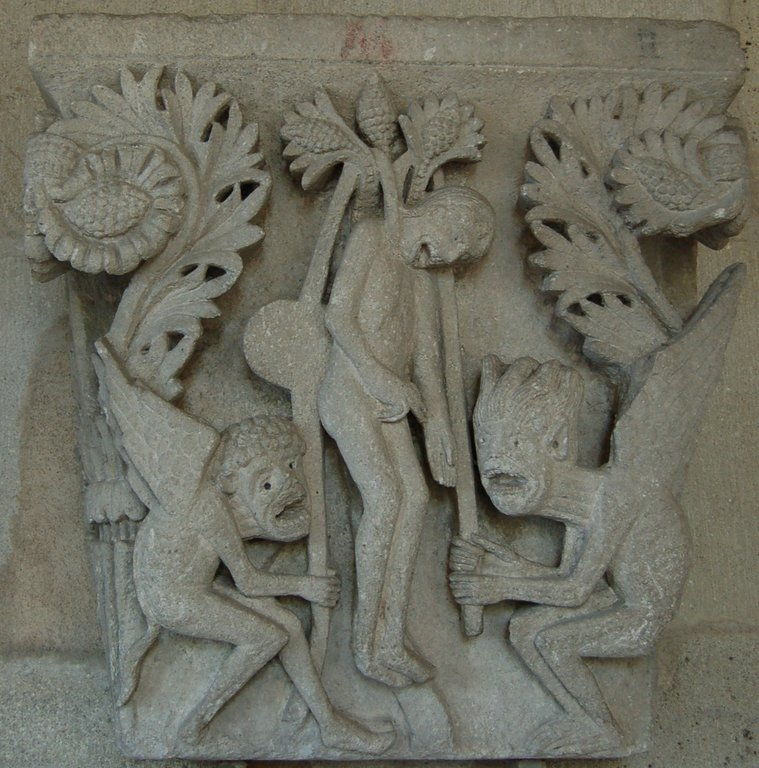 Cathédrale Saint-Lazare d'Autun, Chapiteau: La pendaison de Judas